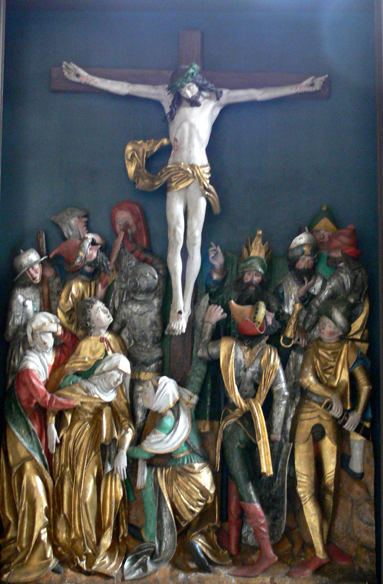 Stadtpfarrkirche St. Maria Magdalena, Münnerstadt Ritterkapelle, Kalvarienberg um 1500